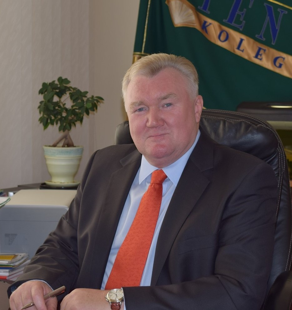 Prof. dr. Gintautas Bužinskas